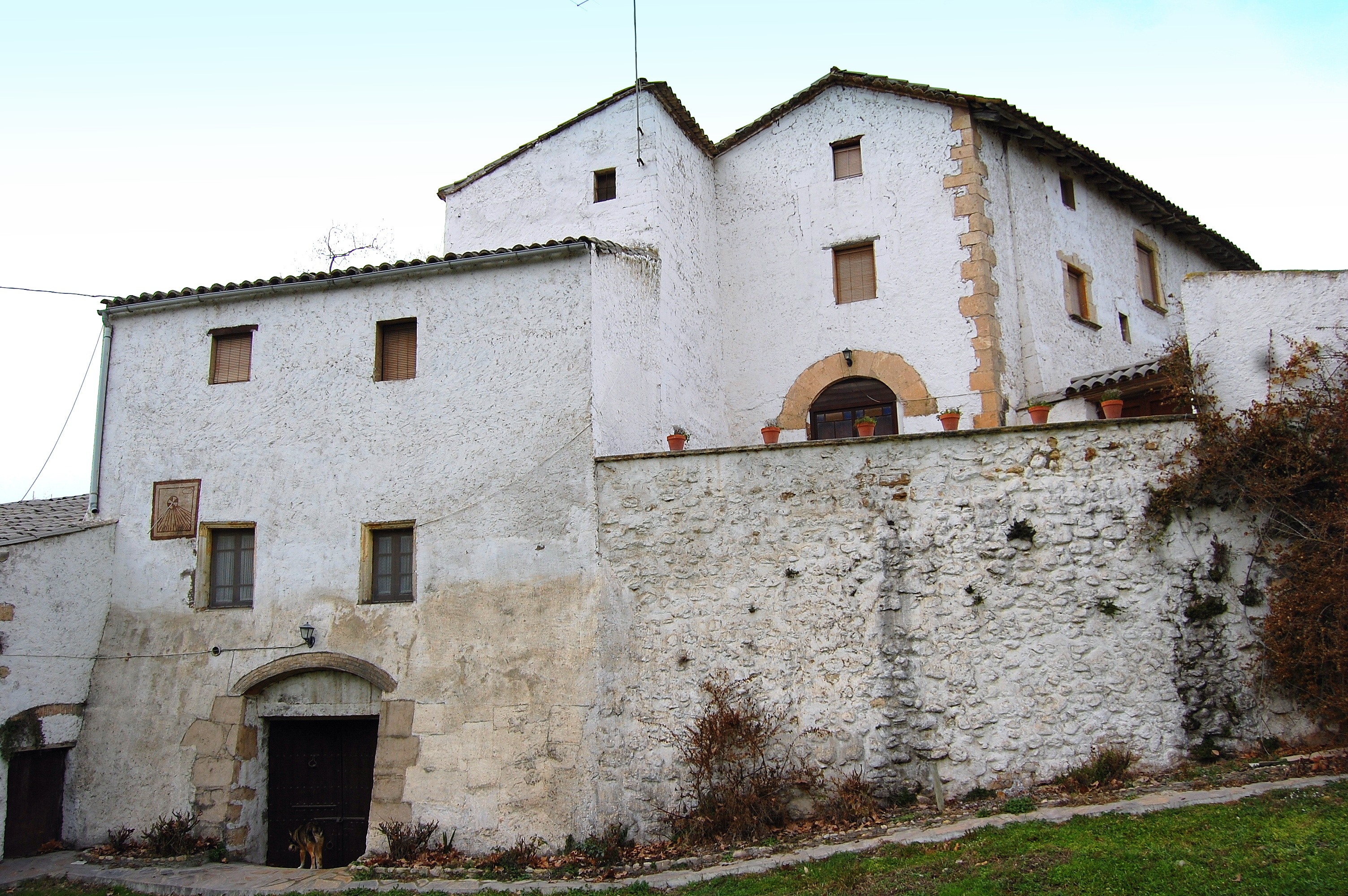 Molí de l'Abadal (Santa Margarida i els Monjos)